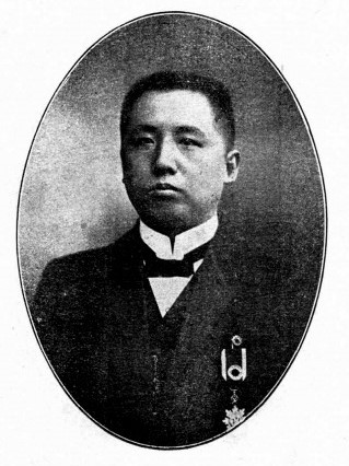 中文（台灣）: 中華民國國會議員